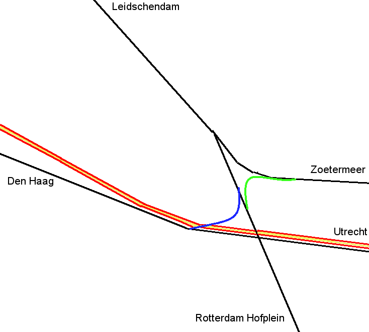 Nootdorpboog